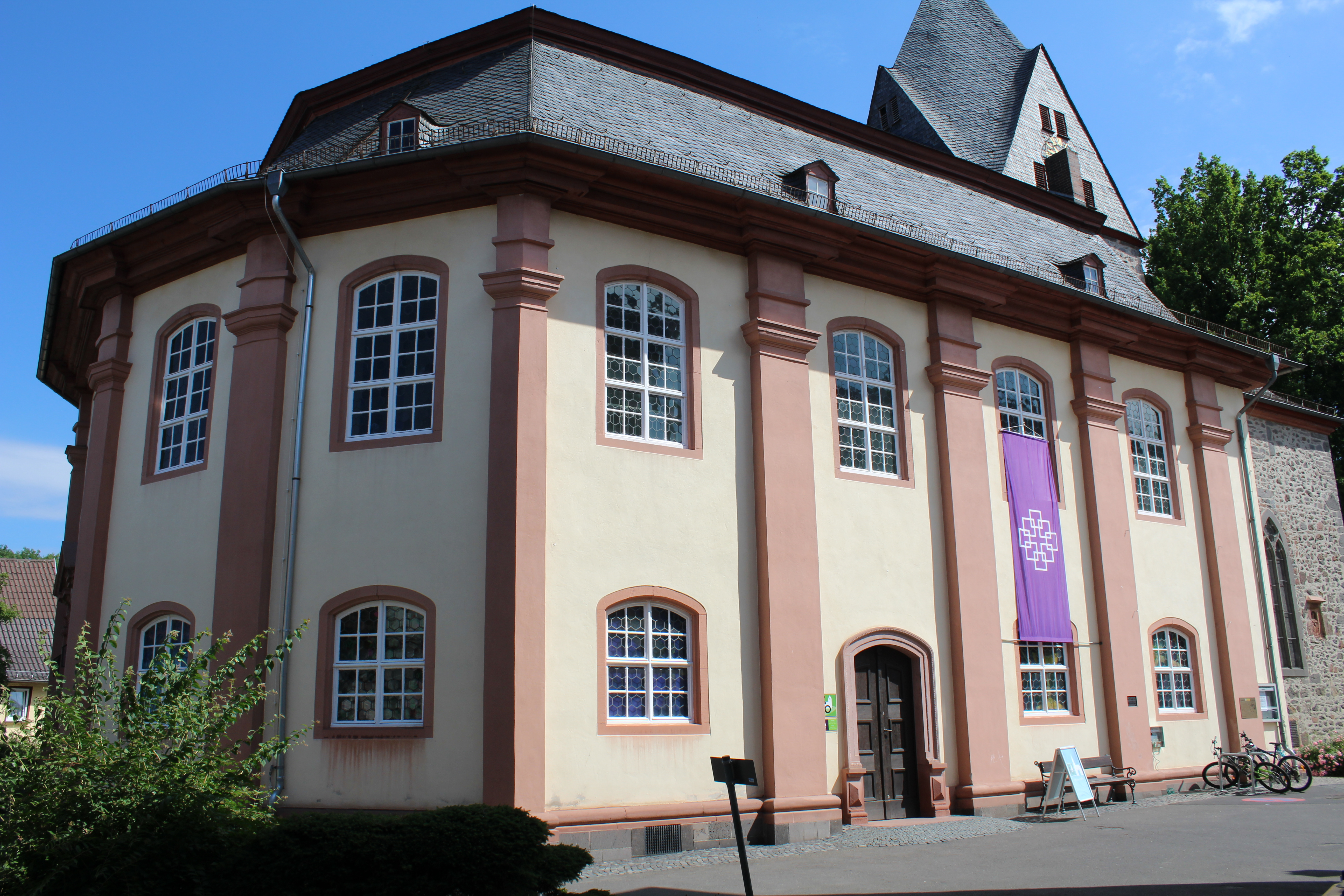 Evangelische Stadtkirche Laubach, Landkreis Gießen, Hessen, Deutschland